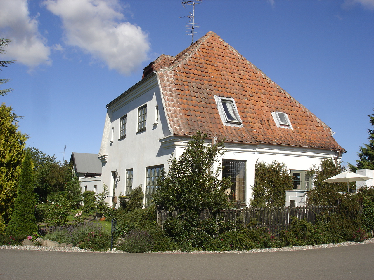 Lindelse Station fra vejside